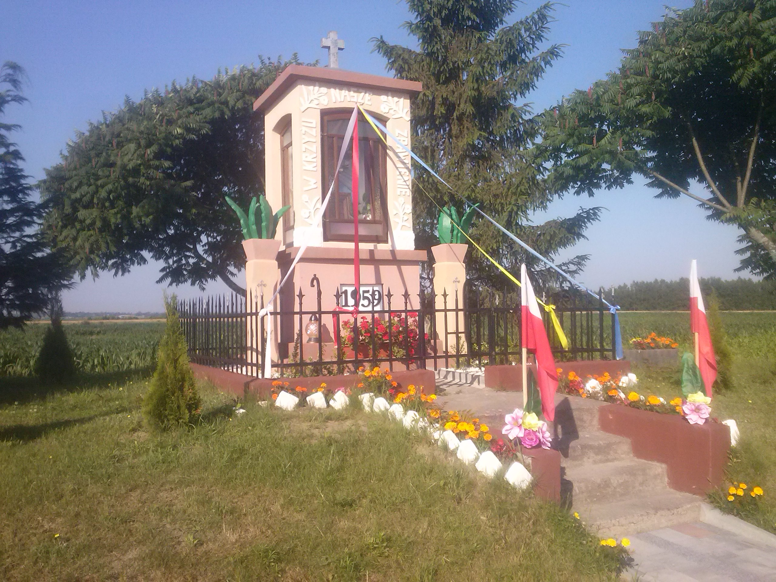 Kapliczka św. Krzyża i Matki Bożej Częstochowskiej w Jagielle z 1959 roku - przy drodze z Wólki Pełkińskiej do Gorliczyny.